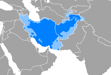 Idioma persa